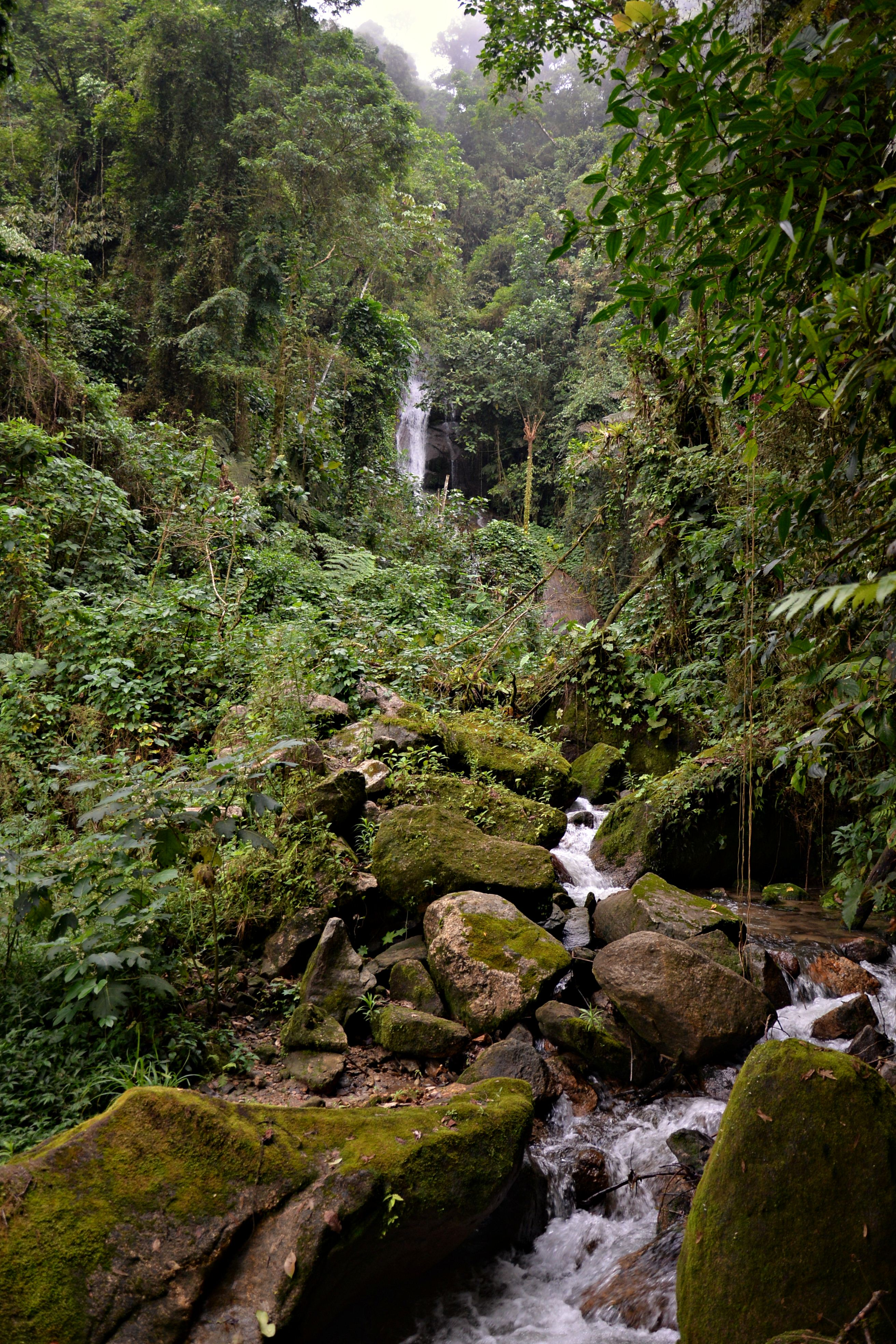 cachoeira localizada na Serra da Bocaina, em Paraty/RJ.